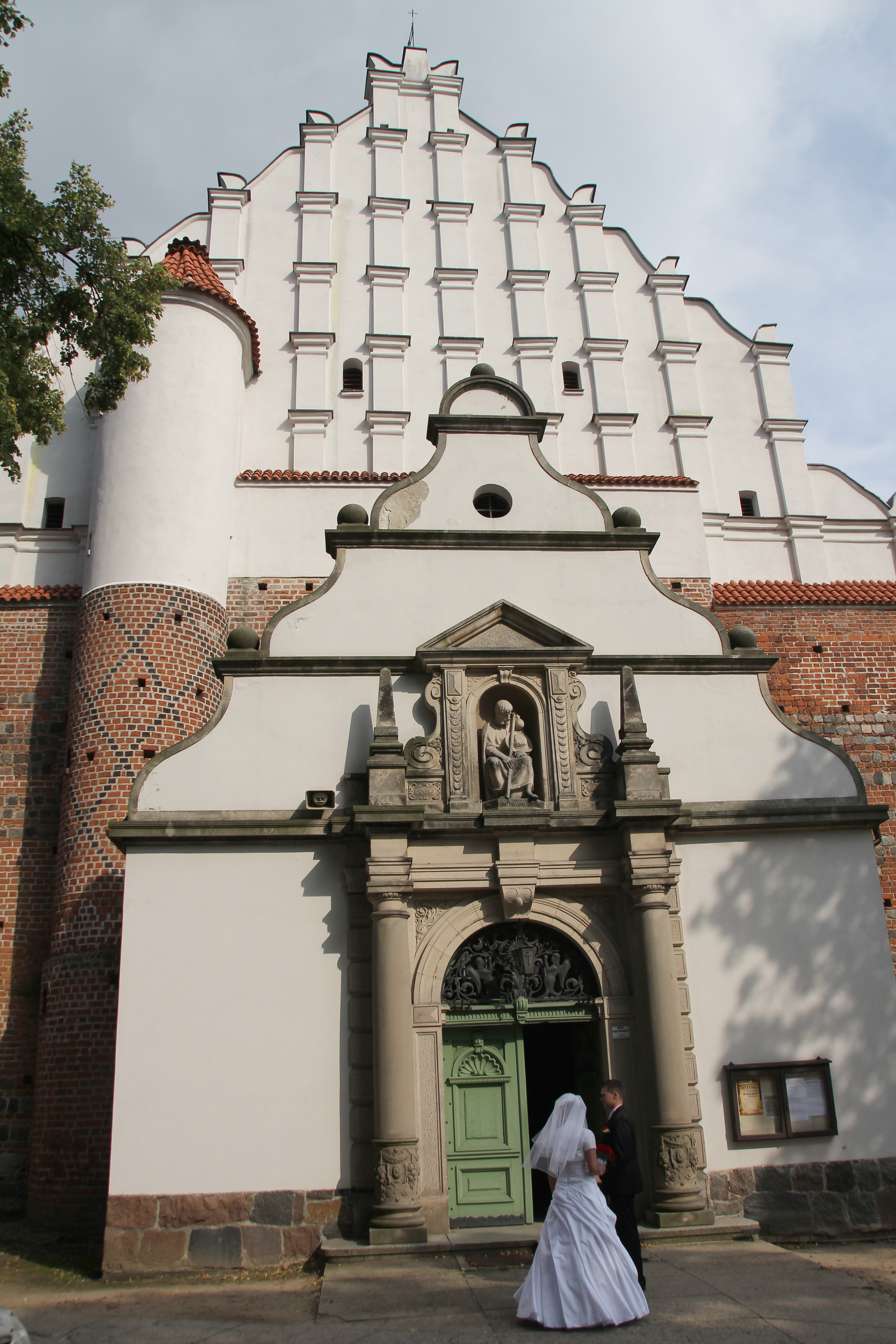 Wągrowiec, ul. Klasztorna 4 - kościół parafialny pw. św. Jakuba Apostoła z 3. ćw. XV w., 2 poł. XVI (zabytek nr Ak-I-11a/260)